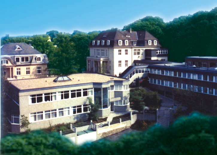 TAW Standort Elberfeld aus der Luft